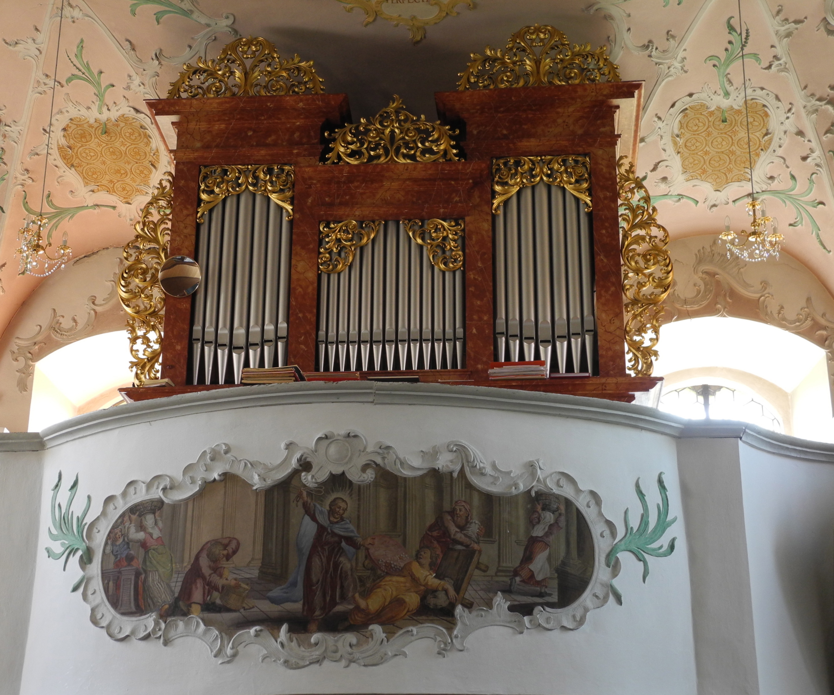 Gehäuse Wolf 1903, Werk Hirnschrodt 1964 (12/II/P)